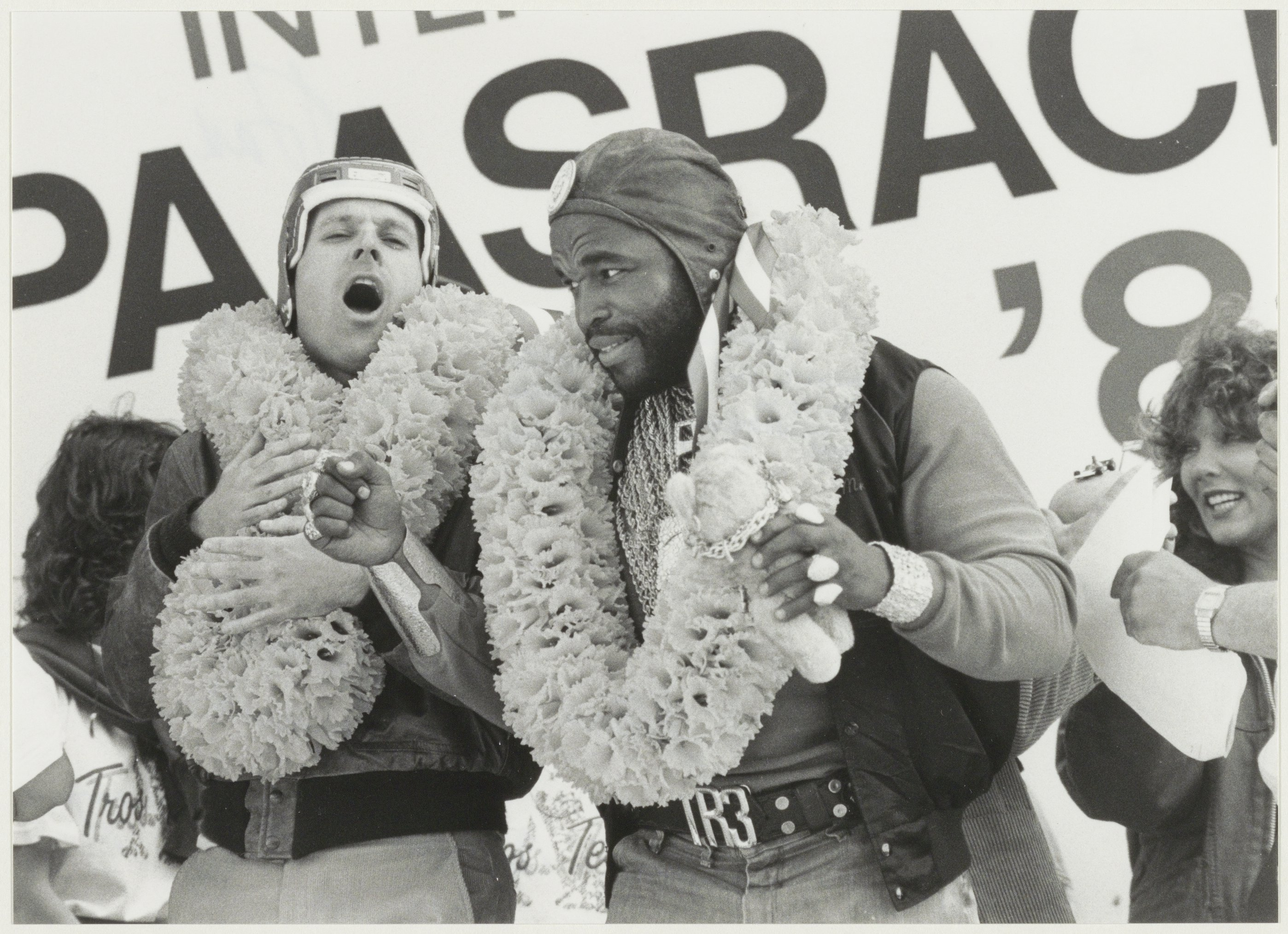 Zandvoort circuit: Medespelers van de bekende Amerikaanse T.V. serie 'The A-team' op het circuit. (Murdoc en BA, rechts Willeke van Ammelrooy)